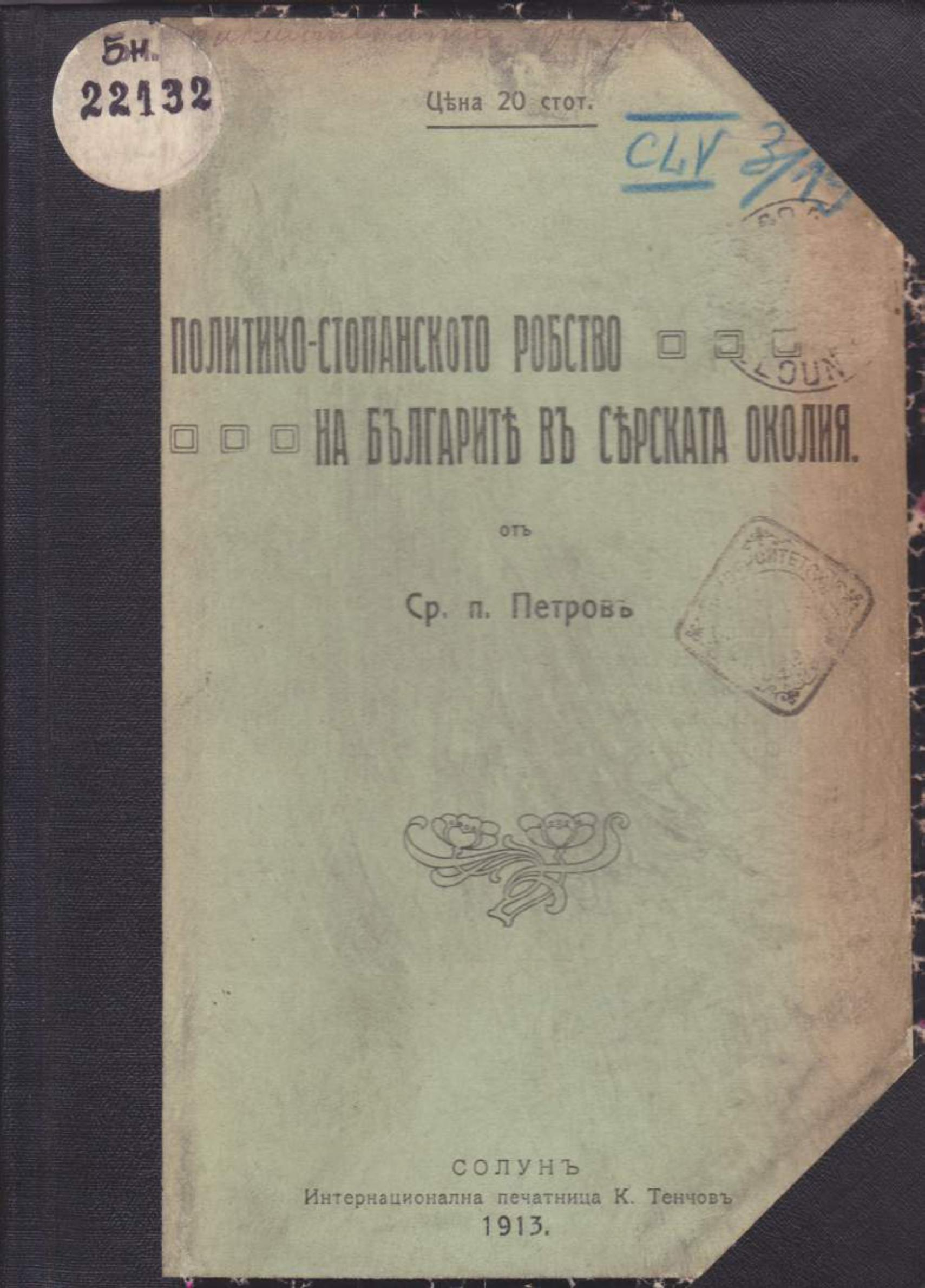 Политико-стопанското робство на българите в Серската околия